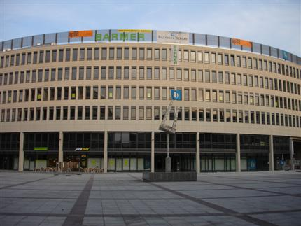 Faktorhaus Ludwigshafen